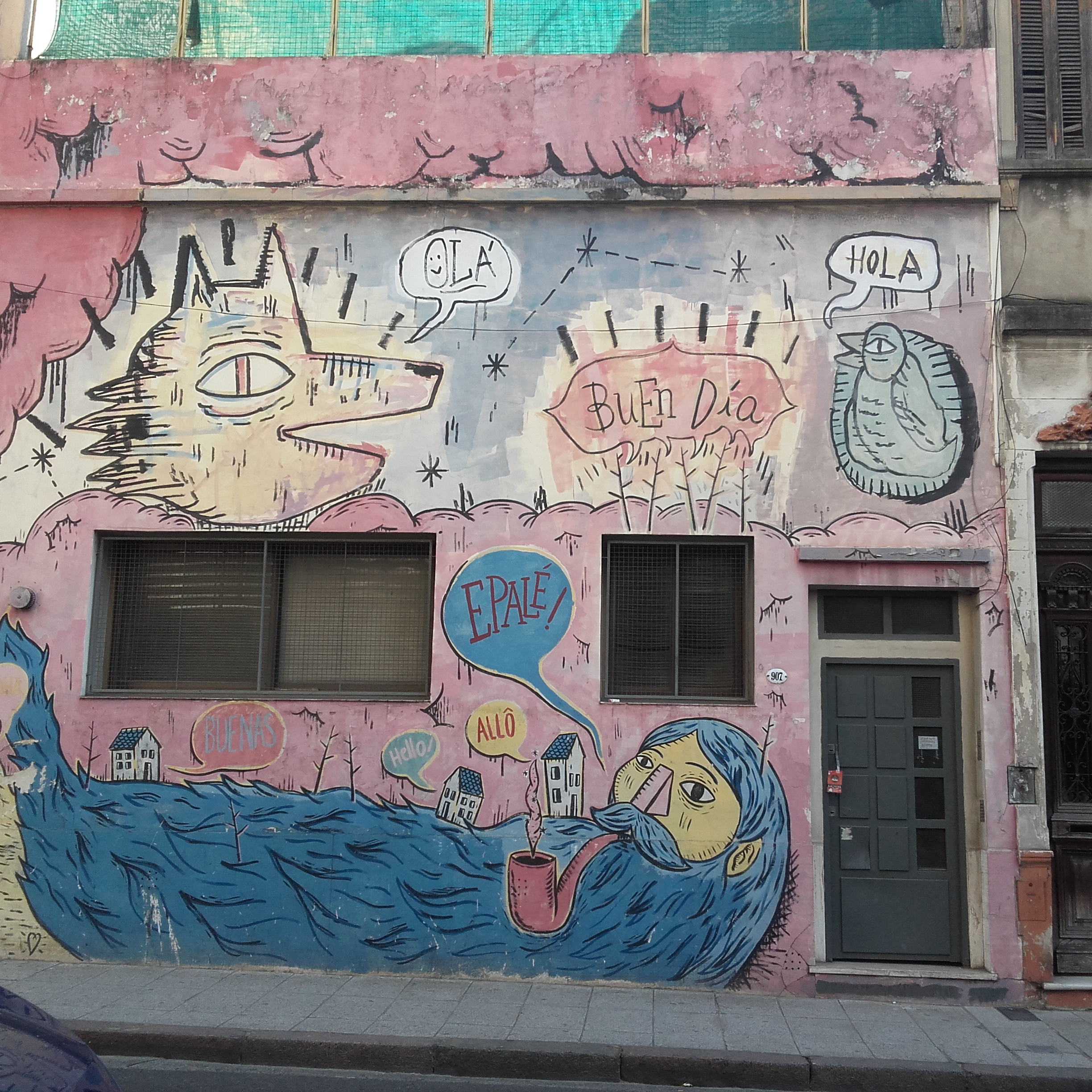 Es un edificio creado por Mané Bernardo y Sarah Bianchi que recoge material relacionado con el mágico arte del títere. Reúne más de mil títulos literarios y cuenta con auditorios en los que se realizan funciones.